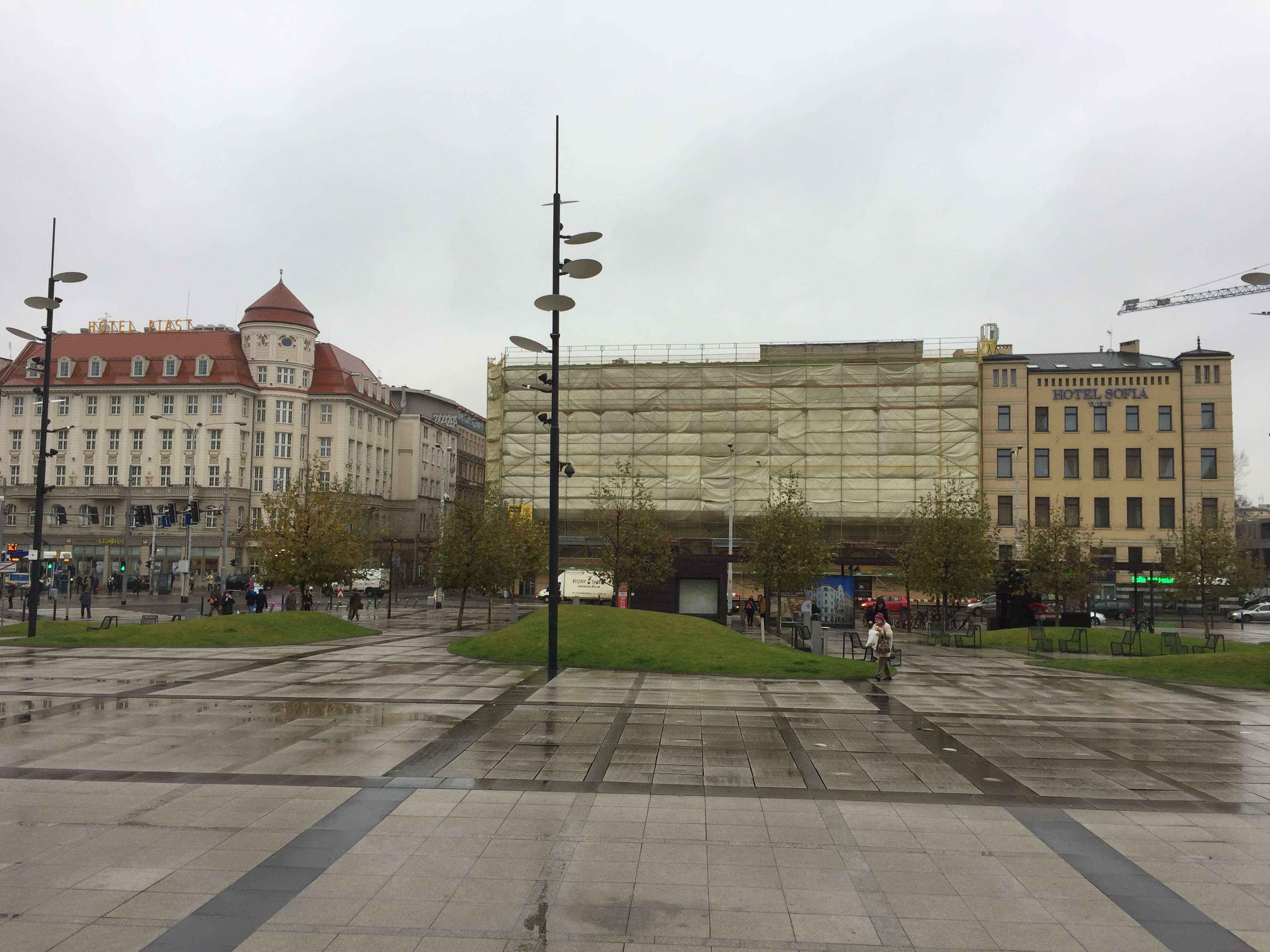 Grand Hotel Wrocław 2017